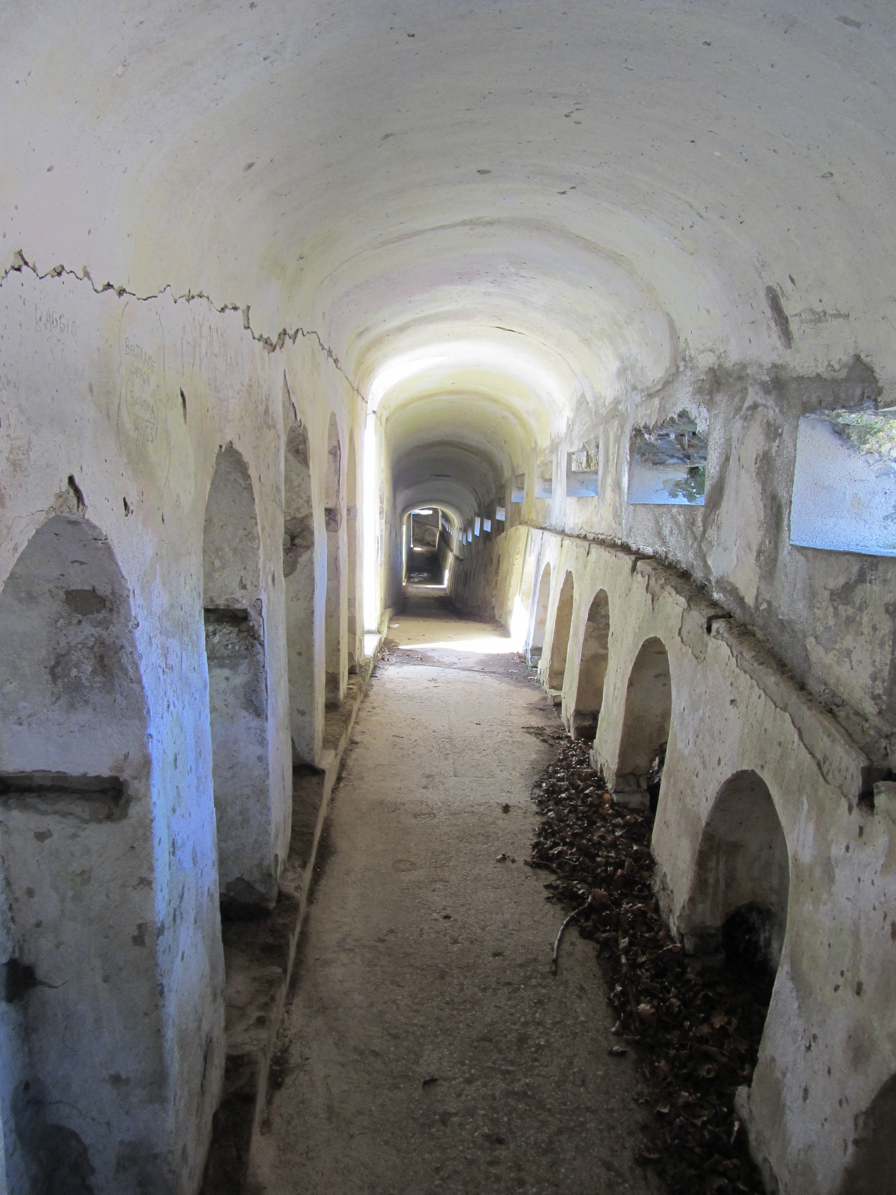 Forte di Monte Ercole Ospedaletto di Gemona (UDINE) - ITALY - Galleria fucilieri